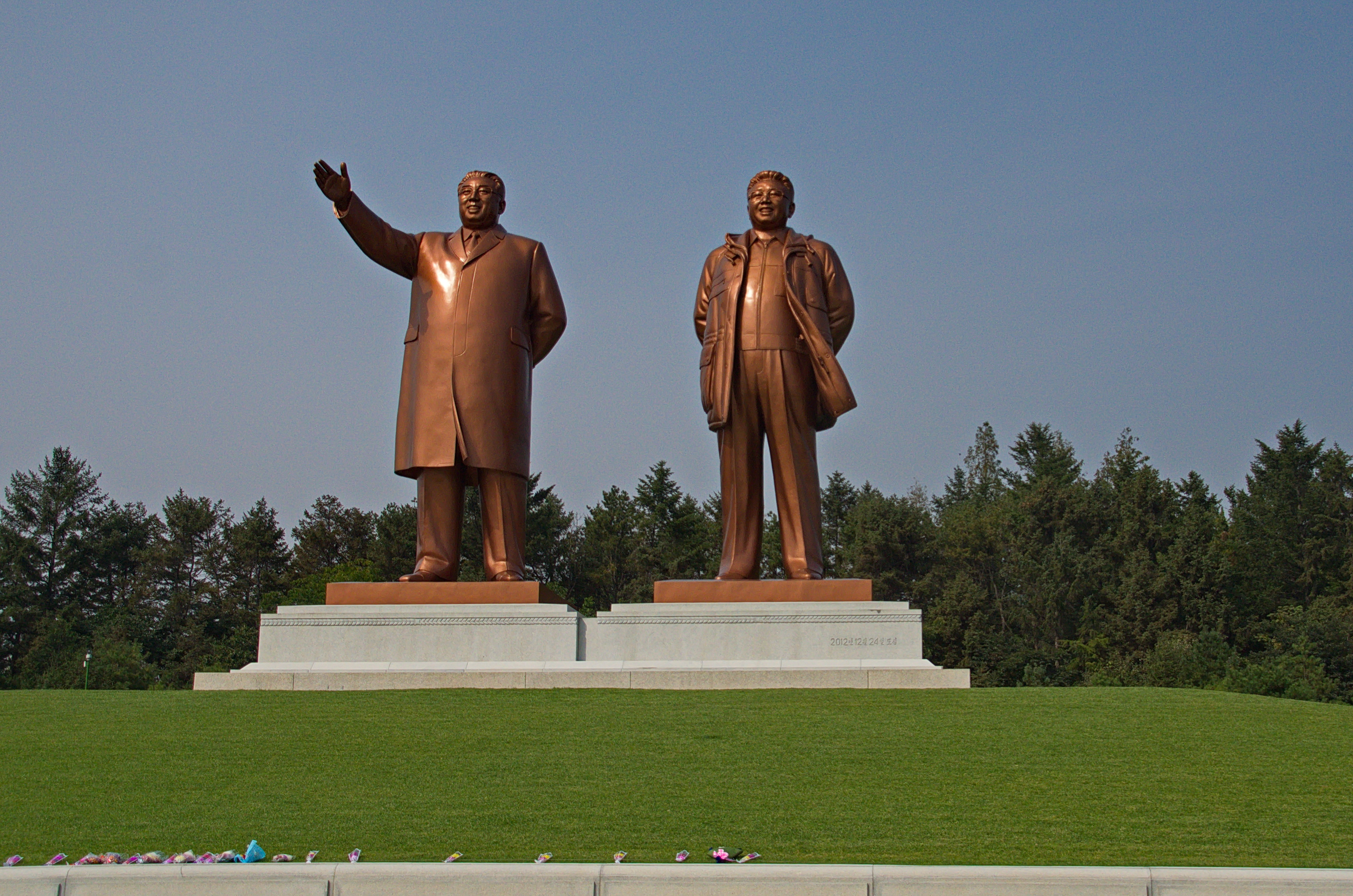 Nordkorea 2015 - Hamhung